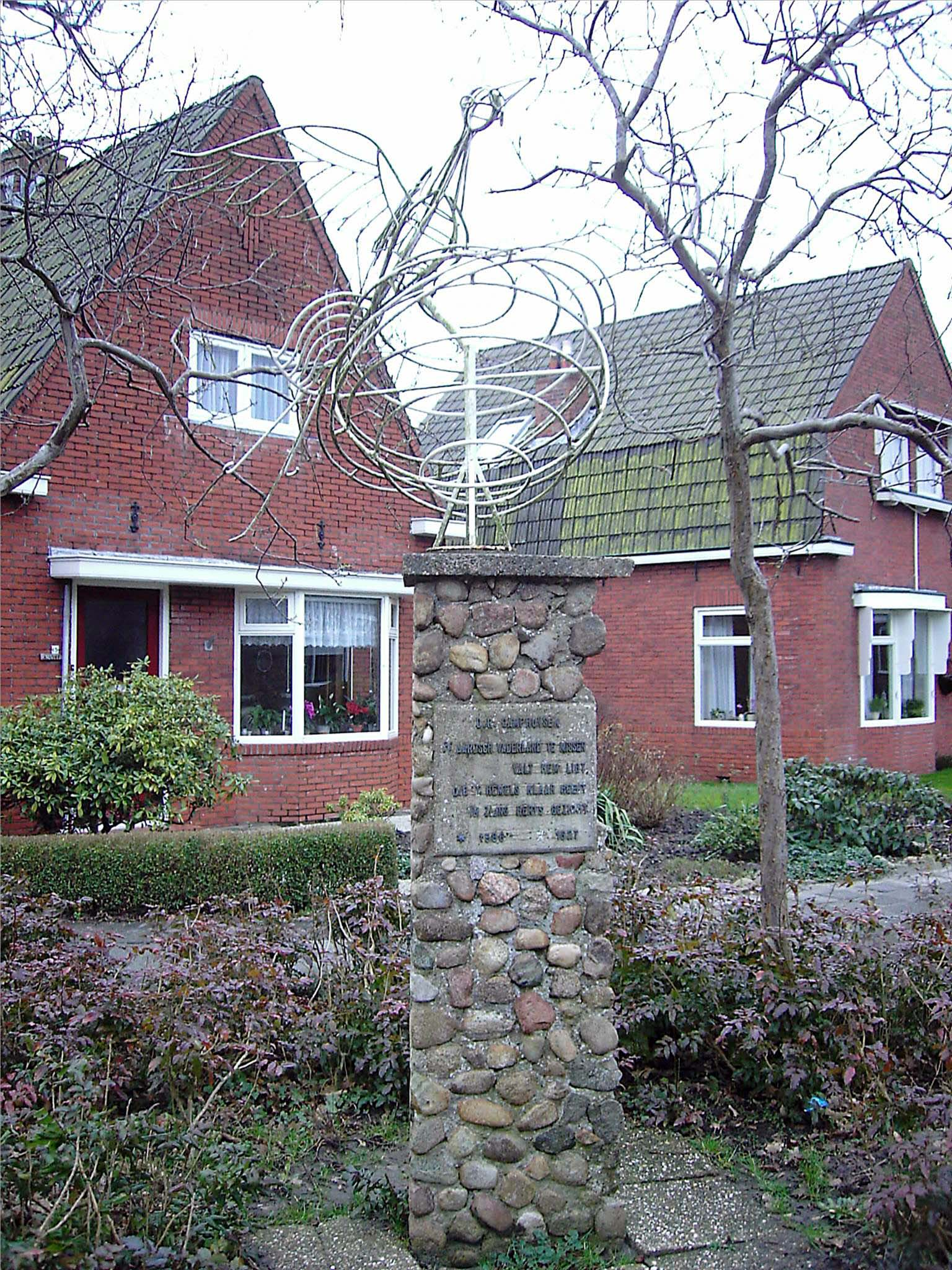 Kunstenaar: Jentsje Popma